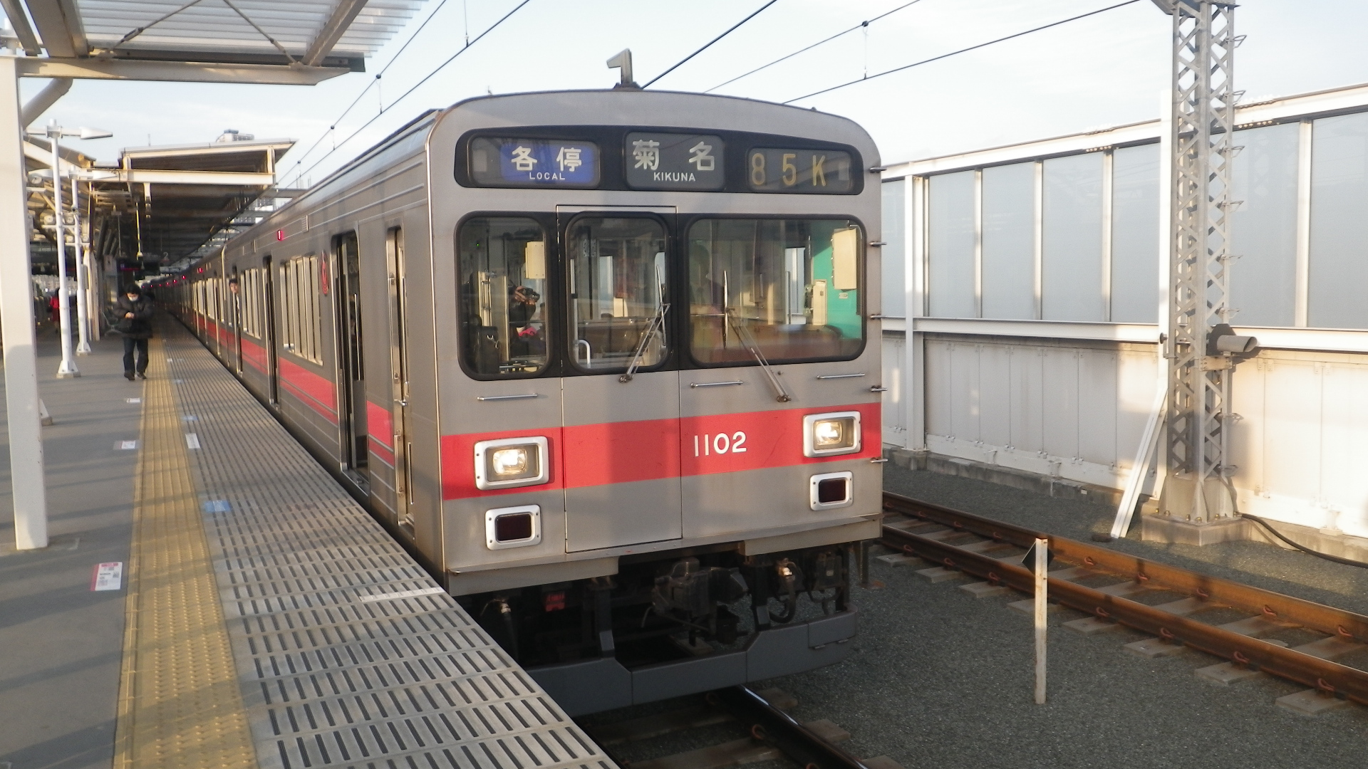 種別幕に「各停」を表示する東急1000系